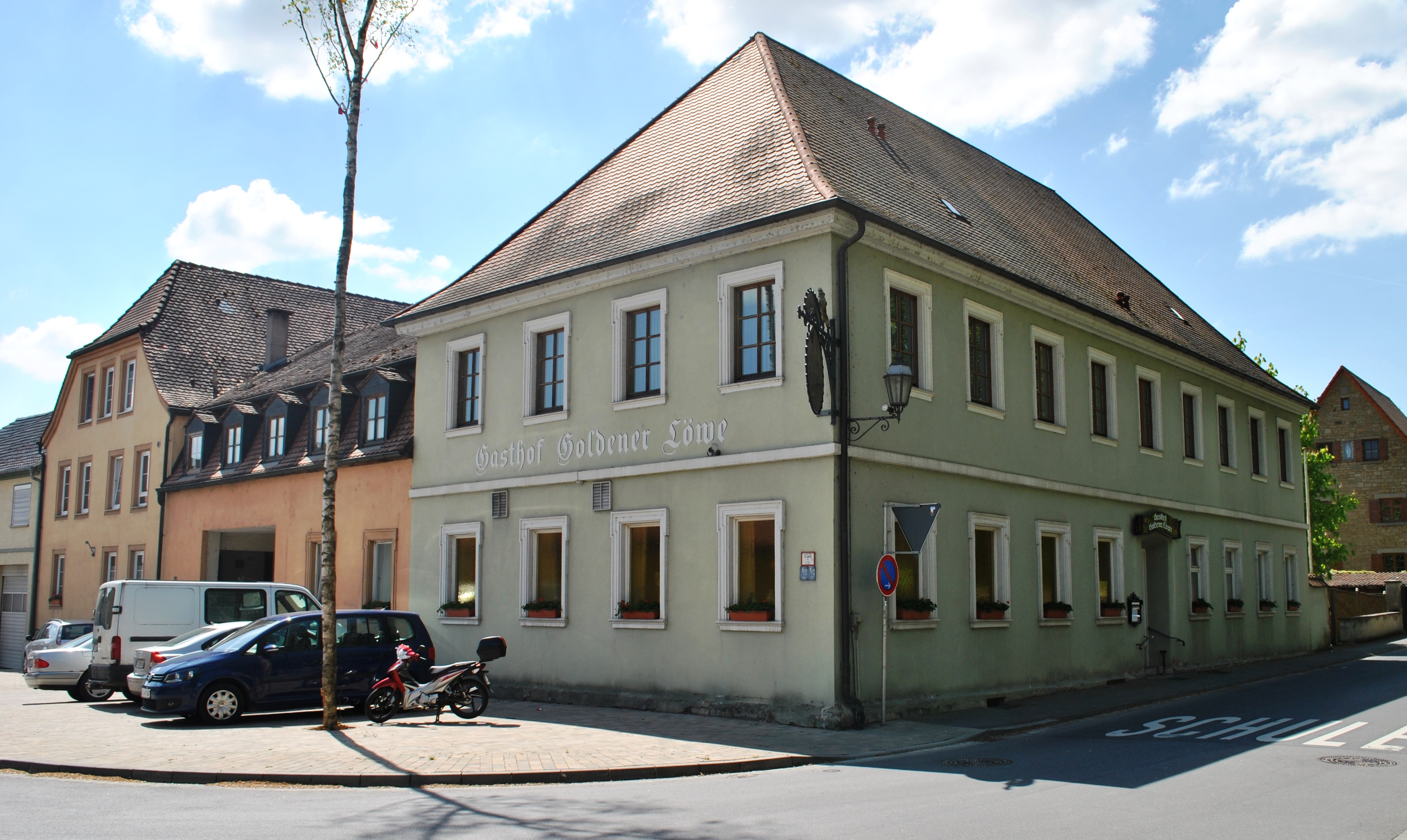 Gasthof zweigeschossiger Walmdachbau mit geohrten Fensterrahmungen, 18./19. Jahrhundert